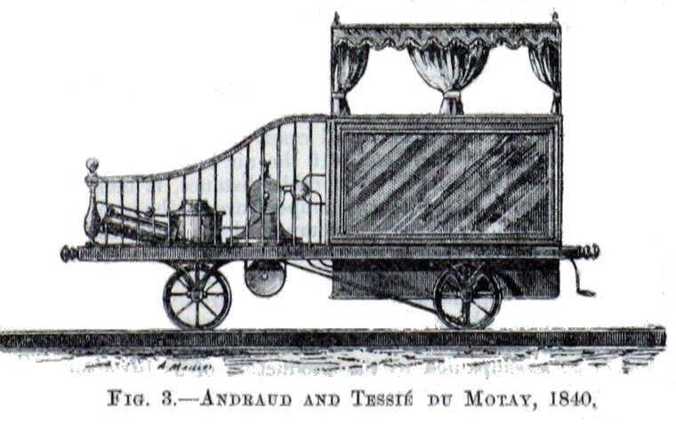 Eisenbahnwagen mit Druckluftantrieb entwickelt von Antoine Andraud und Cyprien Marie Tessié du Motay